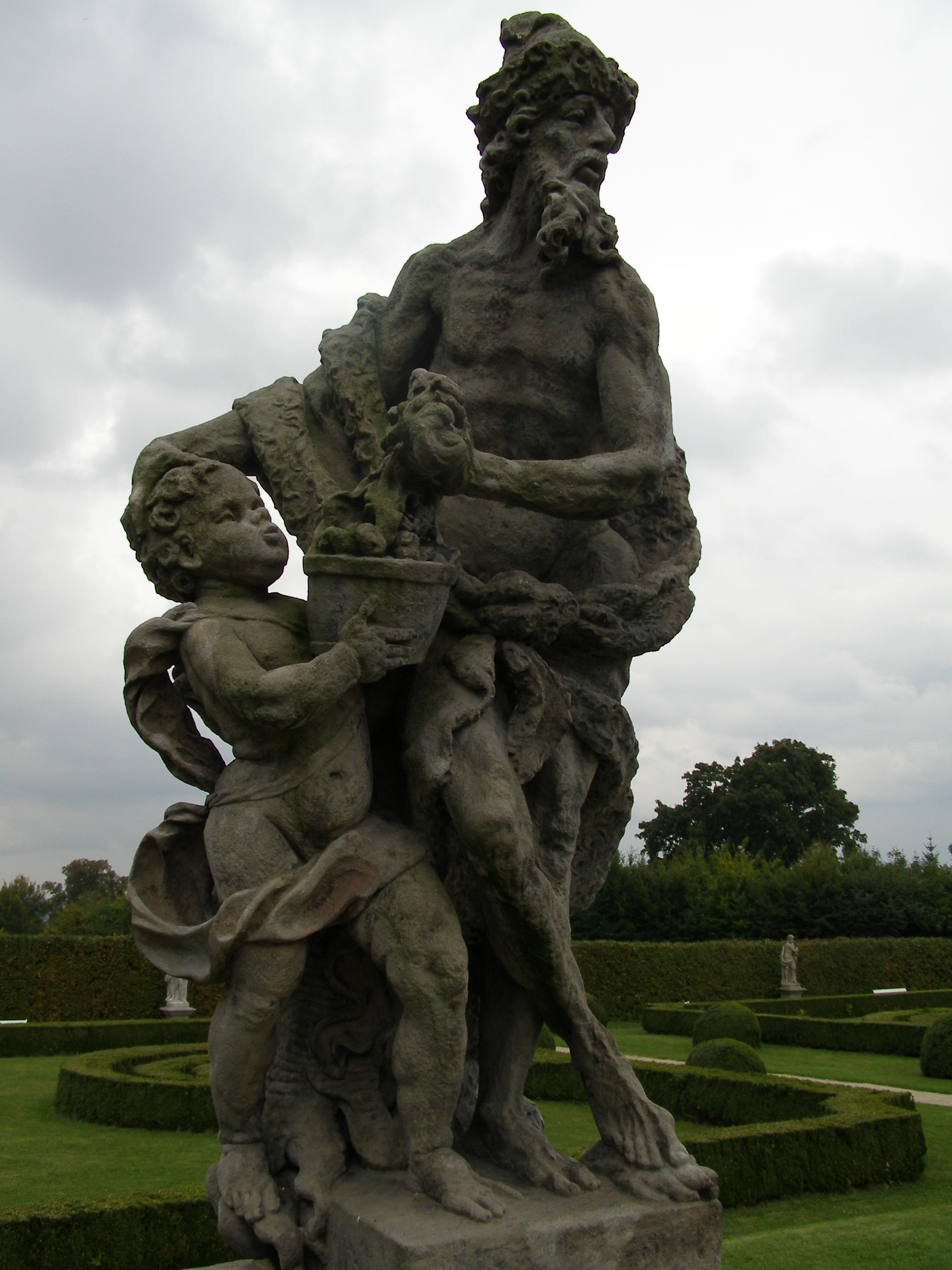 Zámek Lysá nad Labem, Zámecká 1/21, Lysá nad Labem